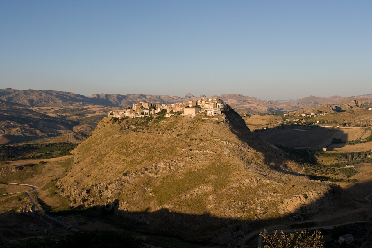 Il centro abitato occupa l'intera sommità della collina